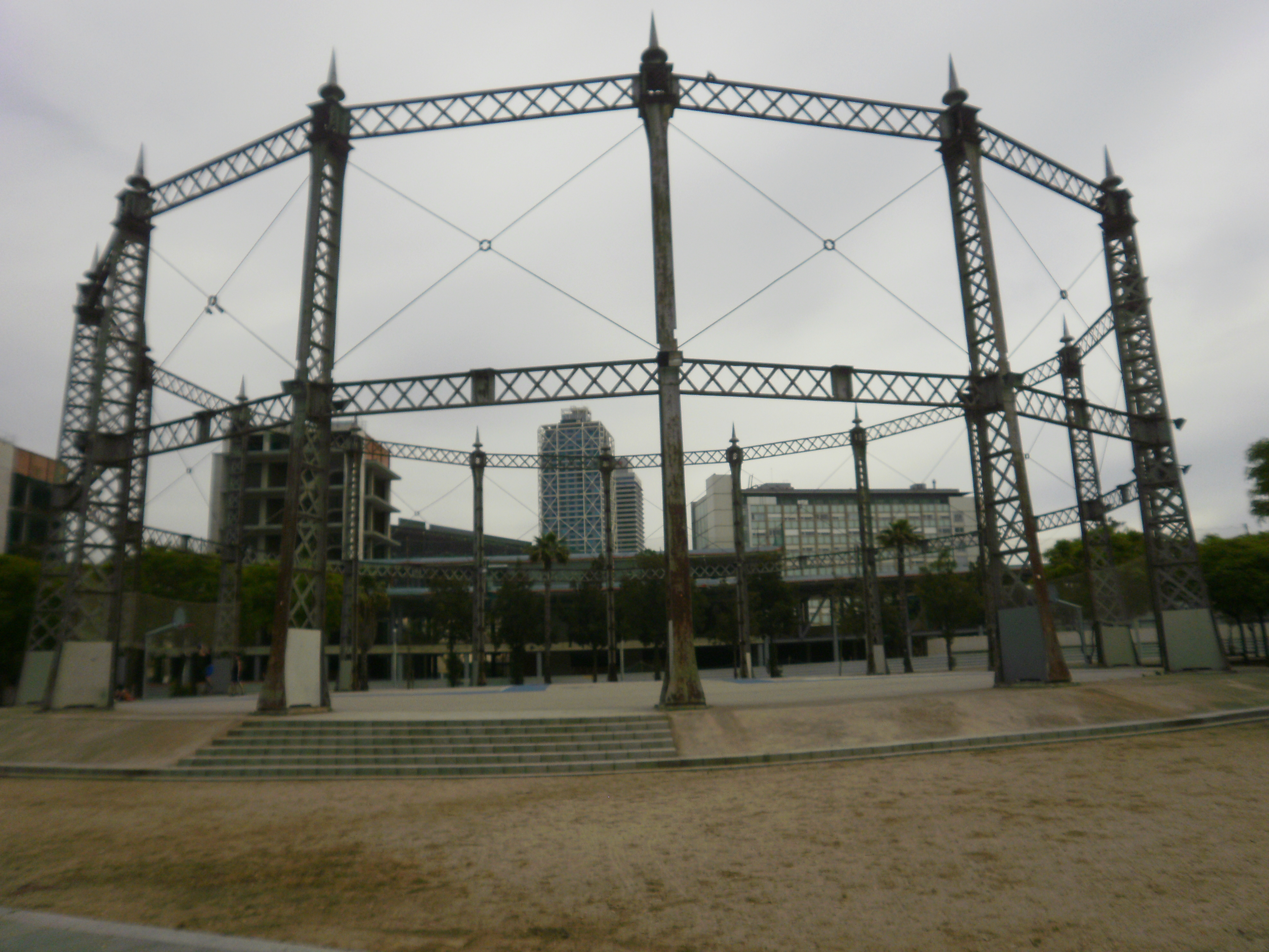 Gasometre de la Catalana de gas